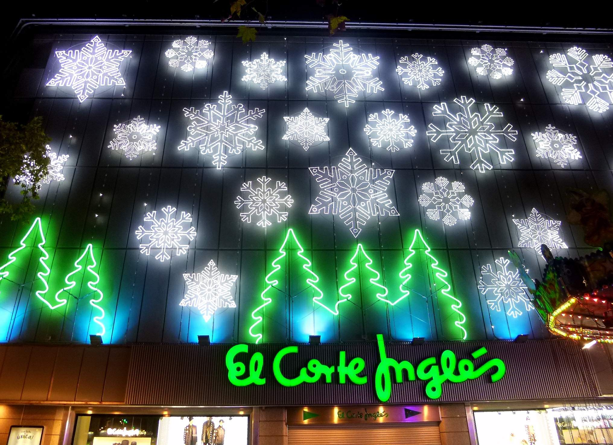 El Corte Inglés de Vitoria con decoración navideña